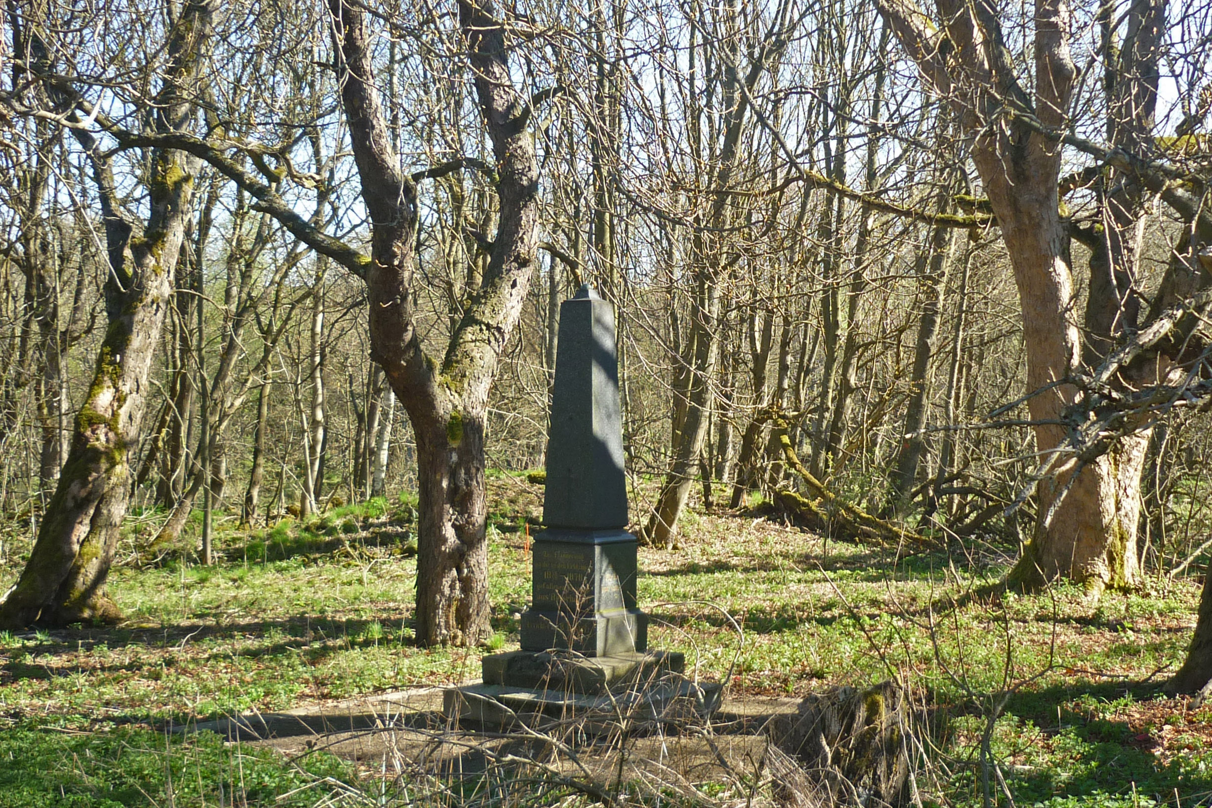 Kriegerdenkmal im ehem. Ort Reischdorf (Rusová) bei Preßnitz (Přísečnice)